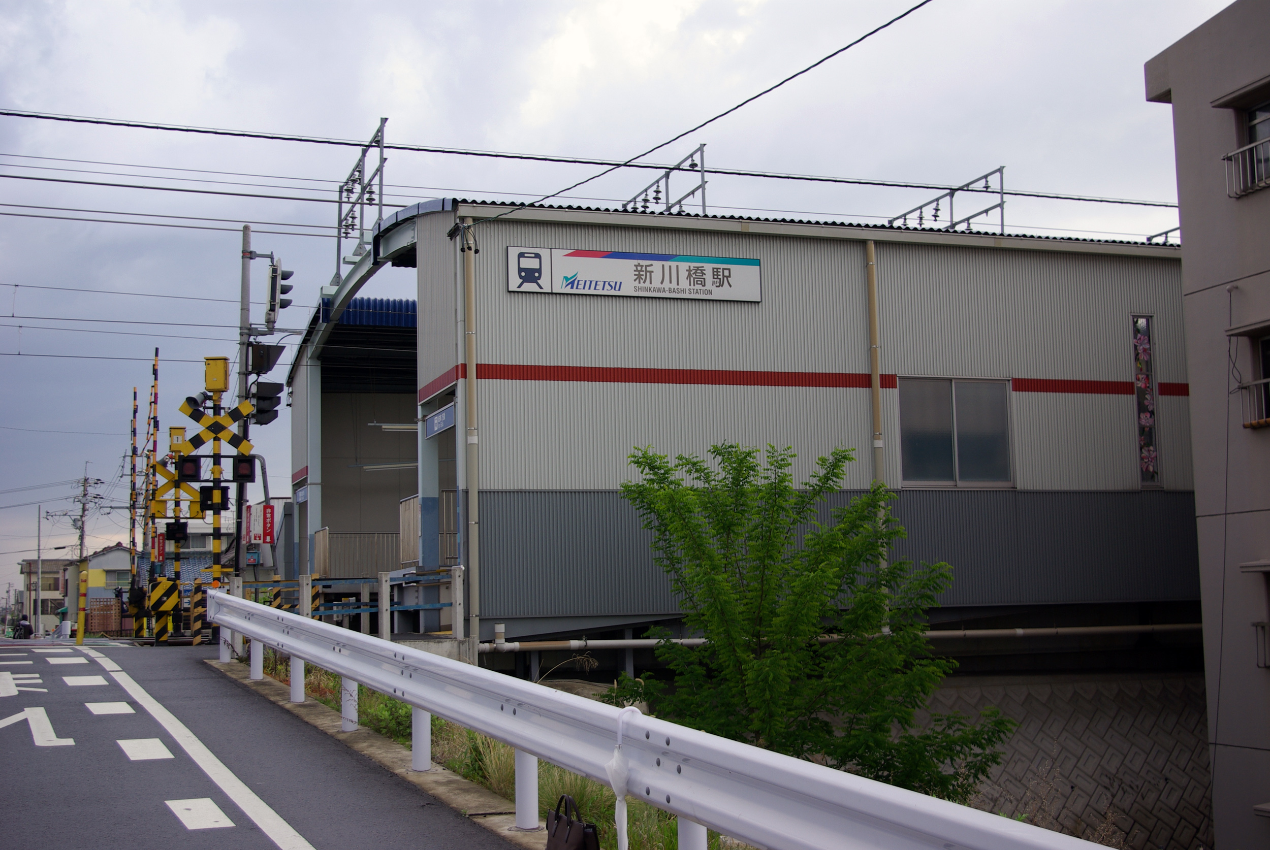 名古屋鉄道本線新川橋駅